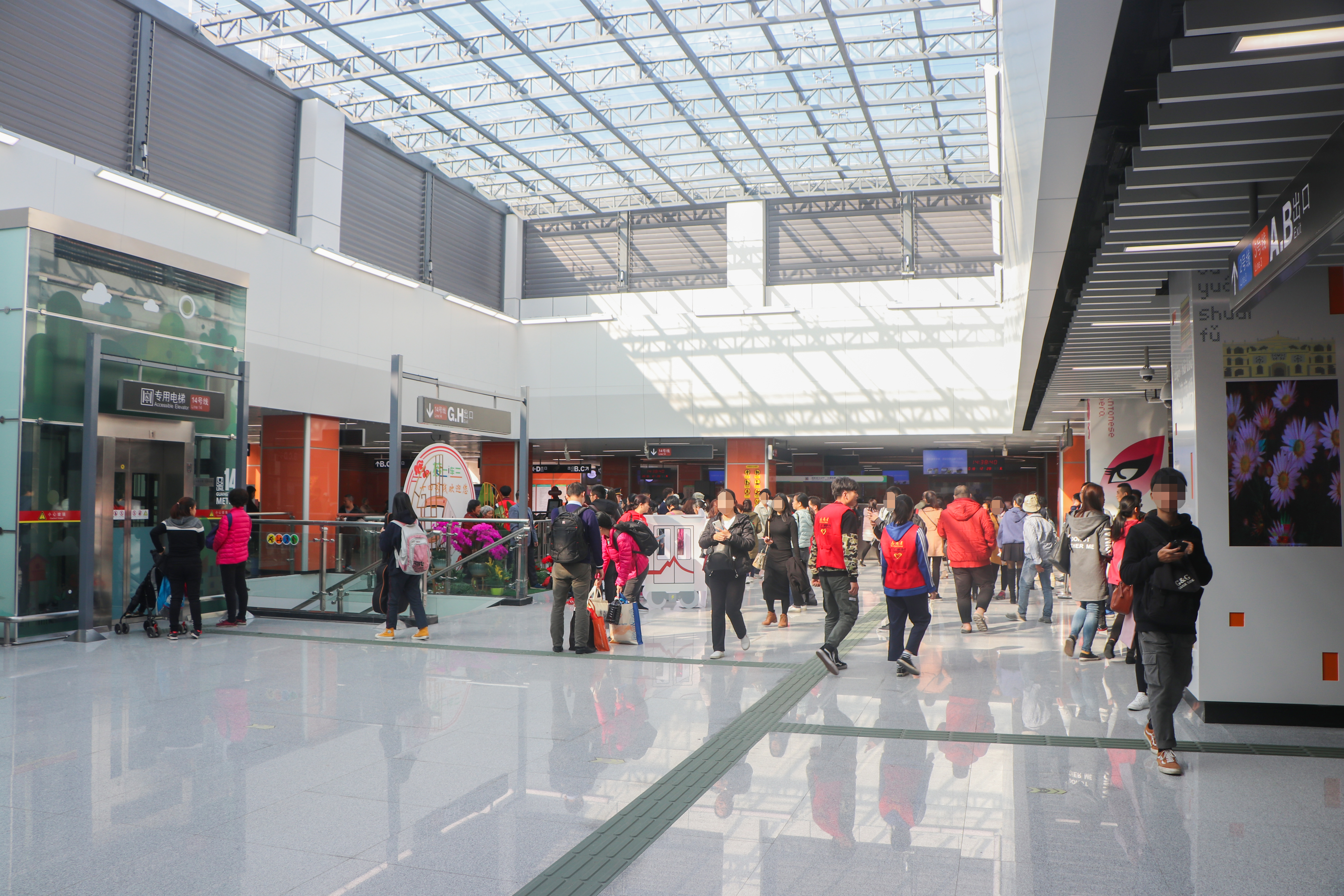 广州地铁嘉禾望岗站